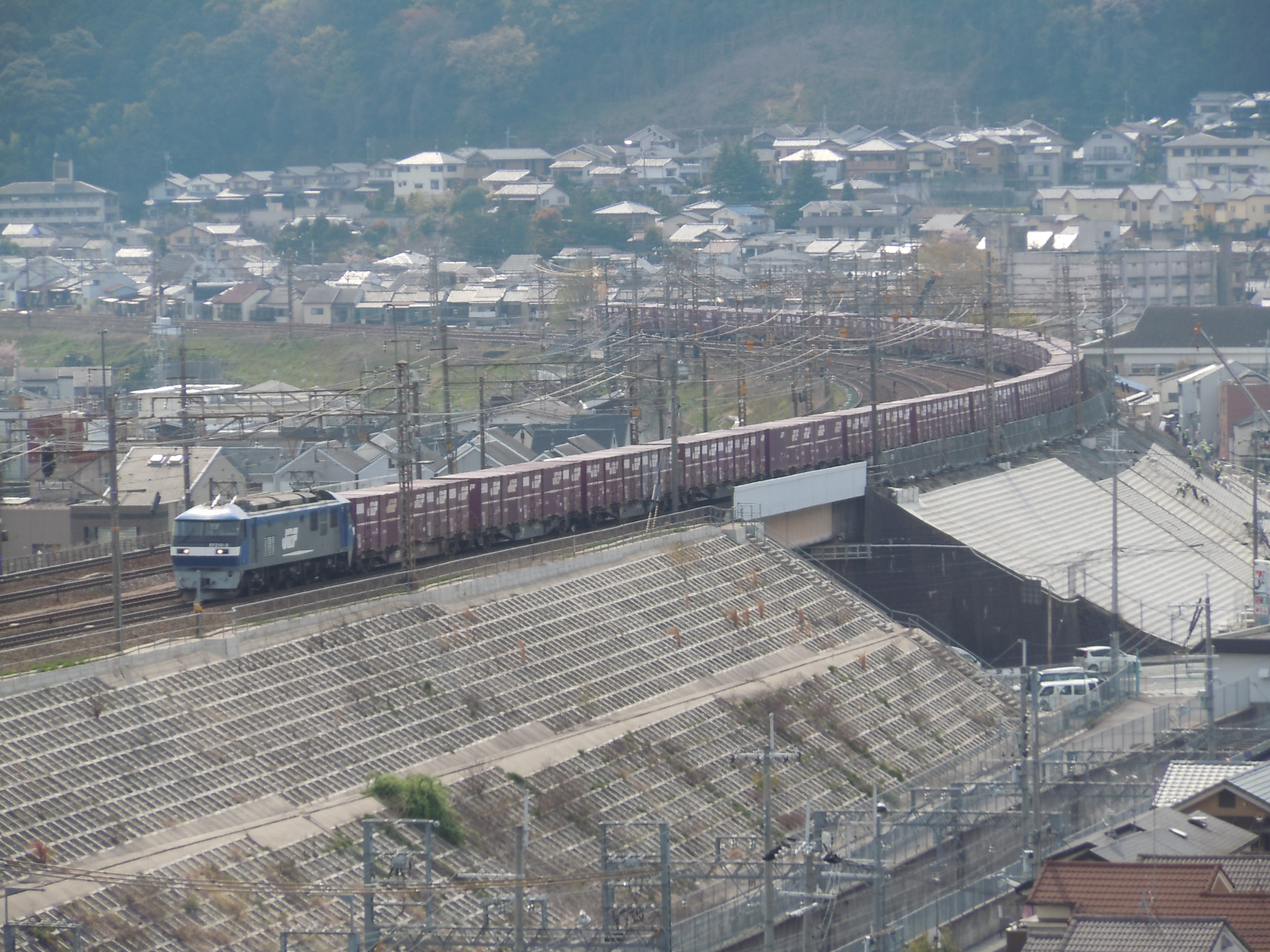 西日本旅客鉄道（JR西）の琵琶湖線を走る貨物列車。山科区、琵琶湖疎水付近から撮影。